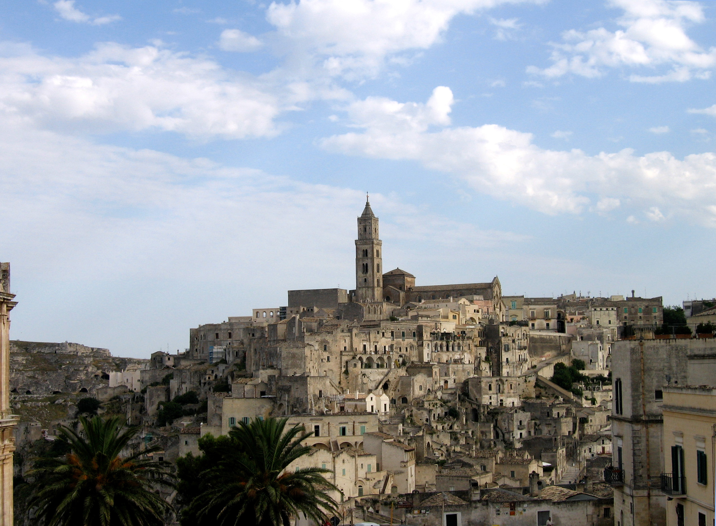 Panorama del "Sasso" Tutte le foto importate su il sito di Matera sono delle foto personale fatte al' ocazione delle ferie (vacanze) nelle Puglie ; sono libere di tutti i diritti. fonte : foto personale Dominique grassigli - agosto 2006